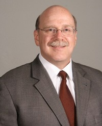 Juan Gutiérrez.